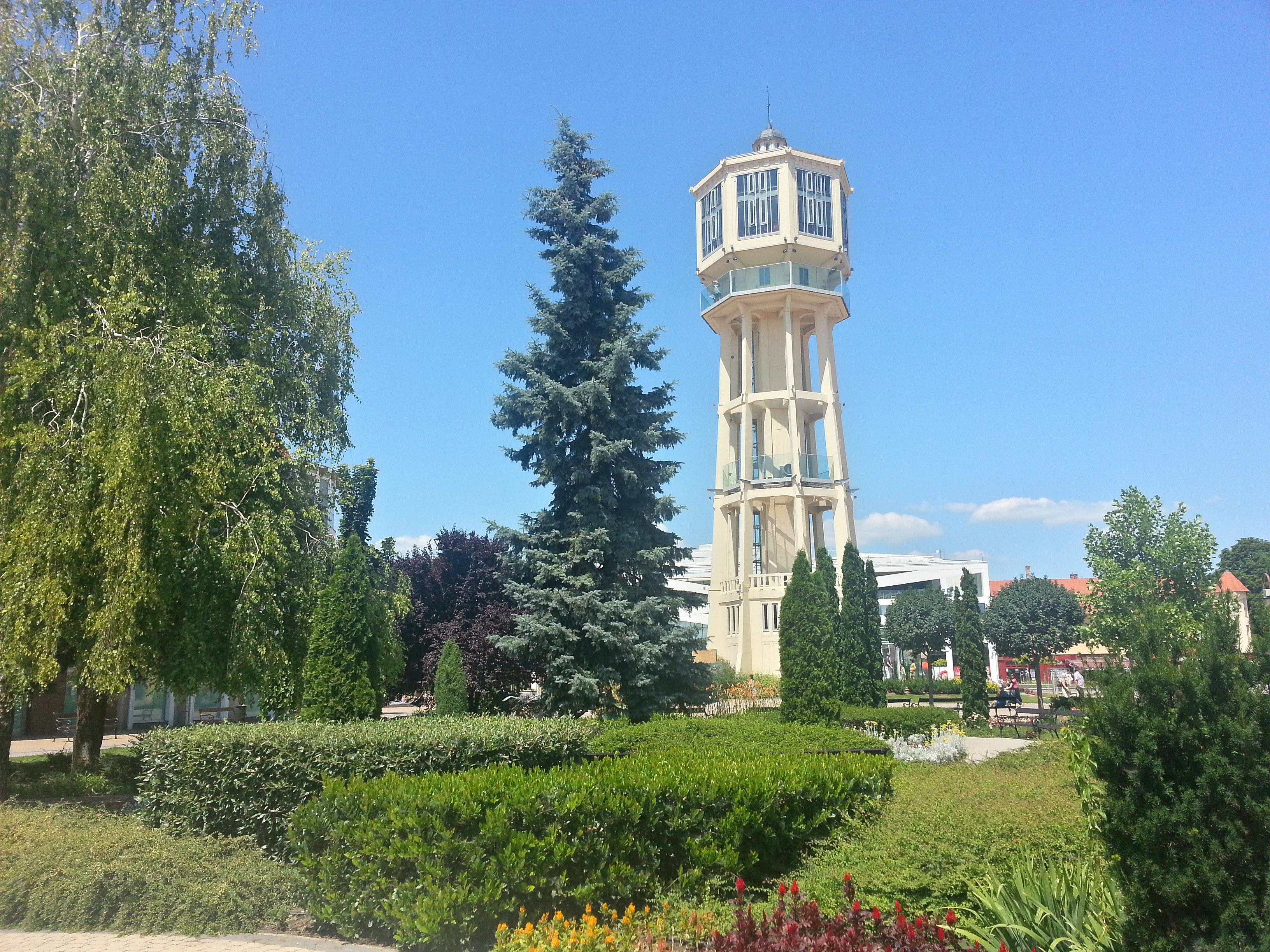 Siófok, Hungary